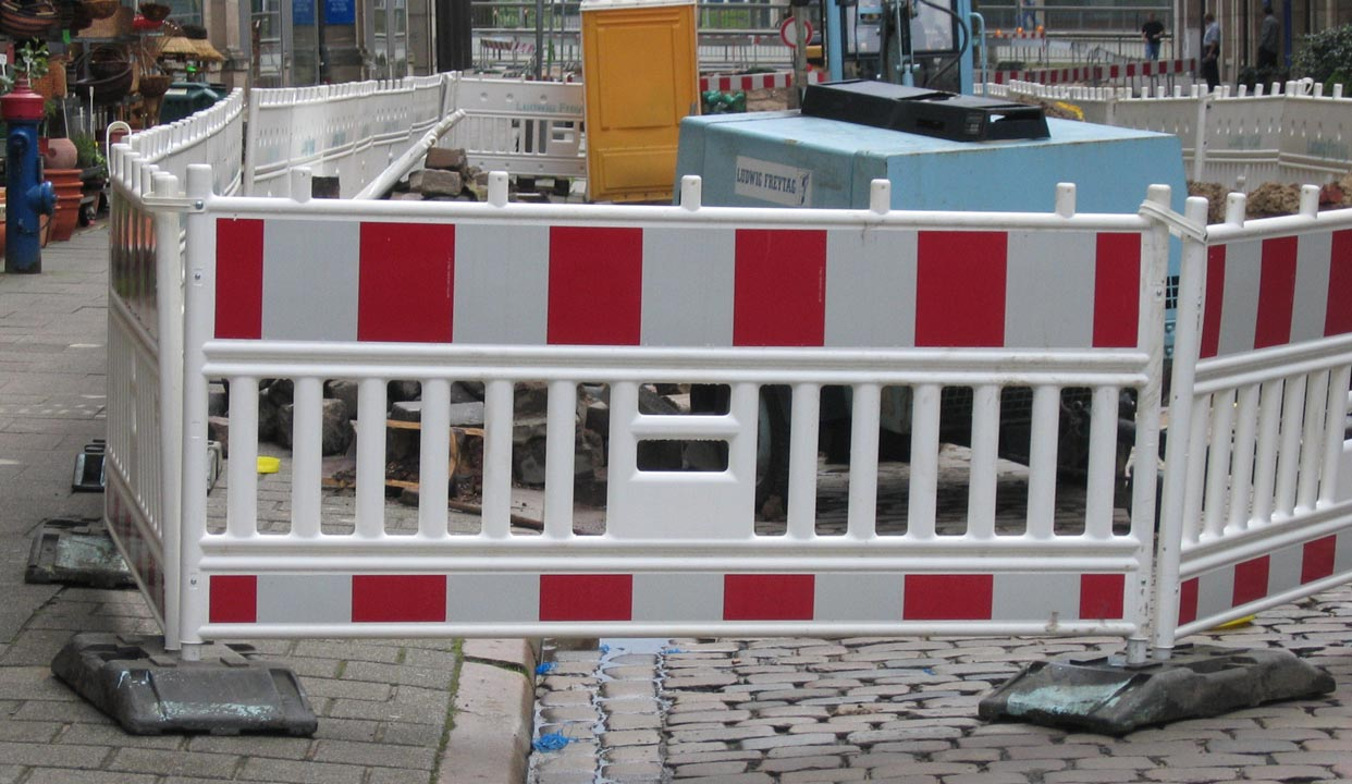 Ein Kunststoff Absperrzaun vor einer Baustelle